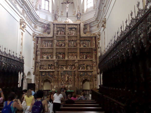 Retablo del Monasterio de Santa María de El Paular, Rascafría. Madrid.